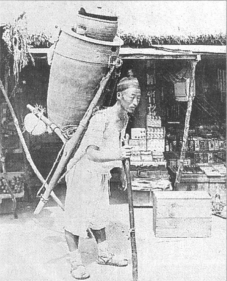 한국어 (조선): 조선 말기의 물장수. 항아리에 물을 이고 다니면서 판매하였다.